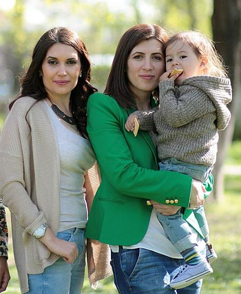 Familia homoparental de mujeres